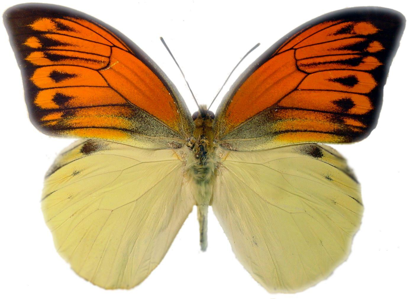 self made.